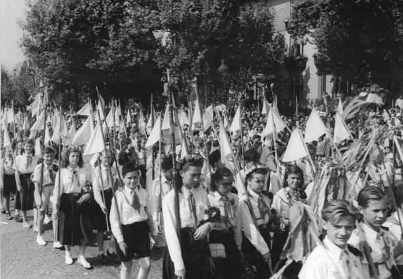 Weltjugendspiele in Budapest beendet-Am 28.August 1949 verabschiedeten sich die ausländischen Delegierten der Weltjugendspiele von Budapest und seiner gastfreundlichen Bevölkerung.Eine große Schlußdemonstration, an der sich alle Delegierten beteiligten, bildeten den Abschluß der Festspiele.In endlos scheinenden Zügen zogen die Delegierten der einzelnen Nationen durch die Straßen der ungarischen Hauptstadt zum Heldenplatz, wo der stellv.Ministerpräsident Matyas Rakosi eine Ansprache hielt.Die Vertreter der Weltjugend gelobten dort, daß sie ihren Kampf für den Frieden bis zum Sieg fortsetzen werden UBz:Junge ungarische Pioniere im Demonstrationszug.Foto:Illus